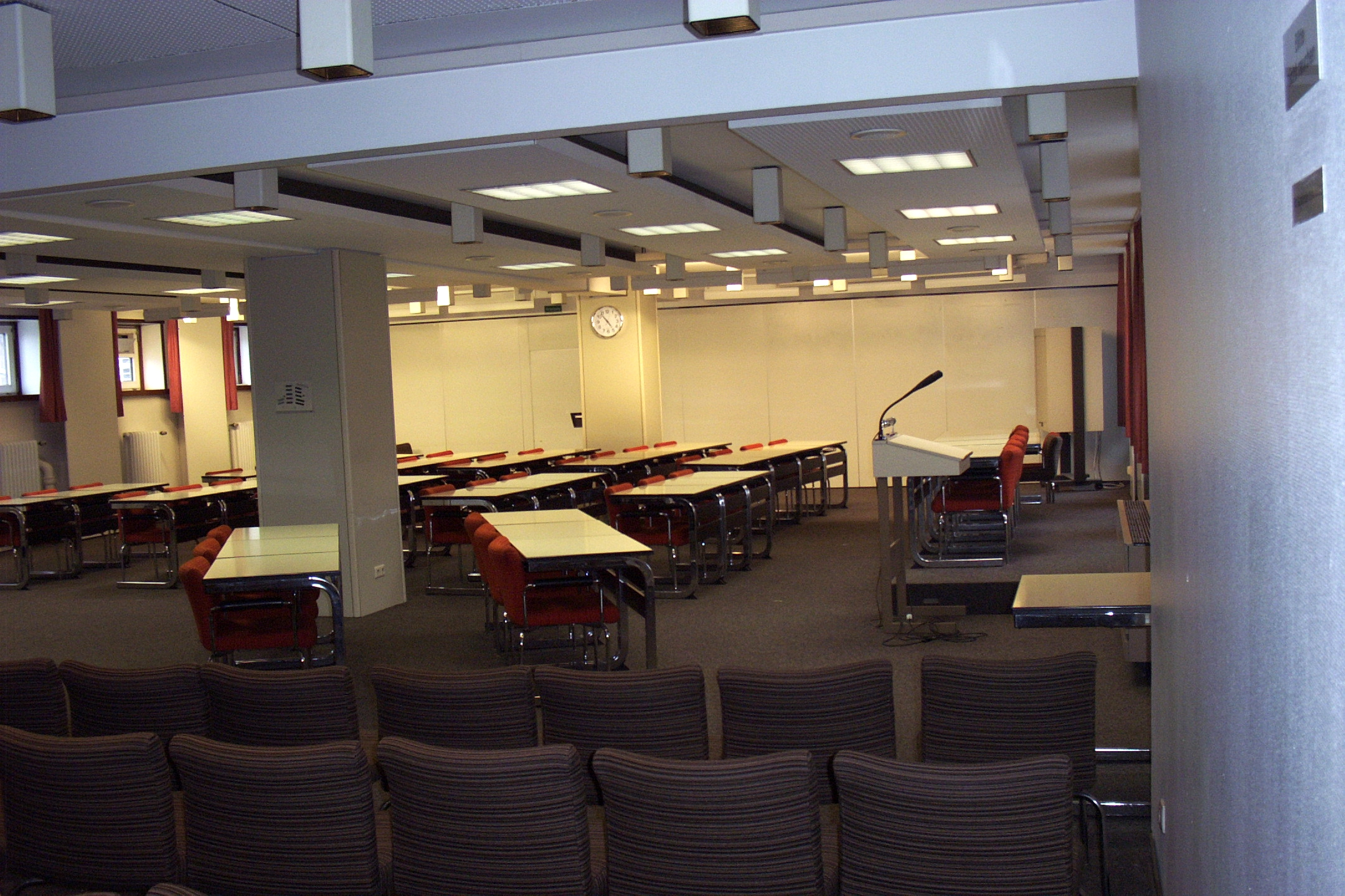 Sitzungssaal der Bezirksversammlung Hamburg-Mitte (vom Zuschauerbereich aus gesehen)